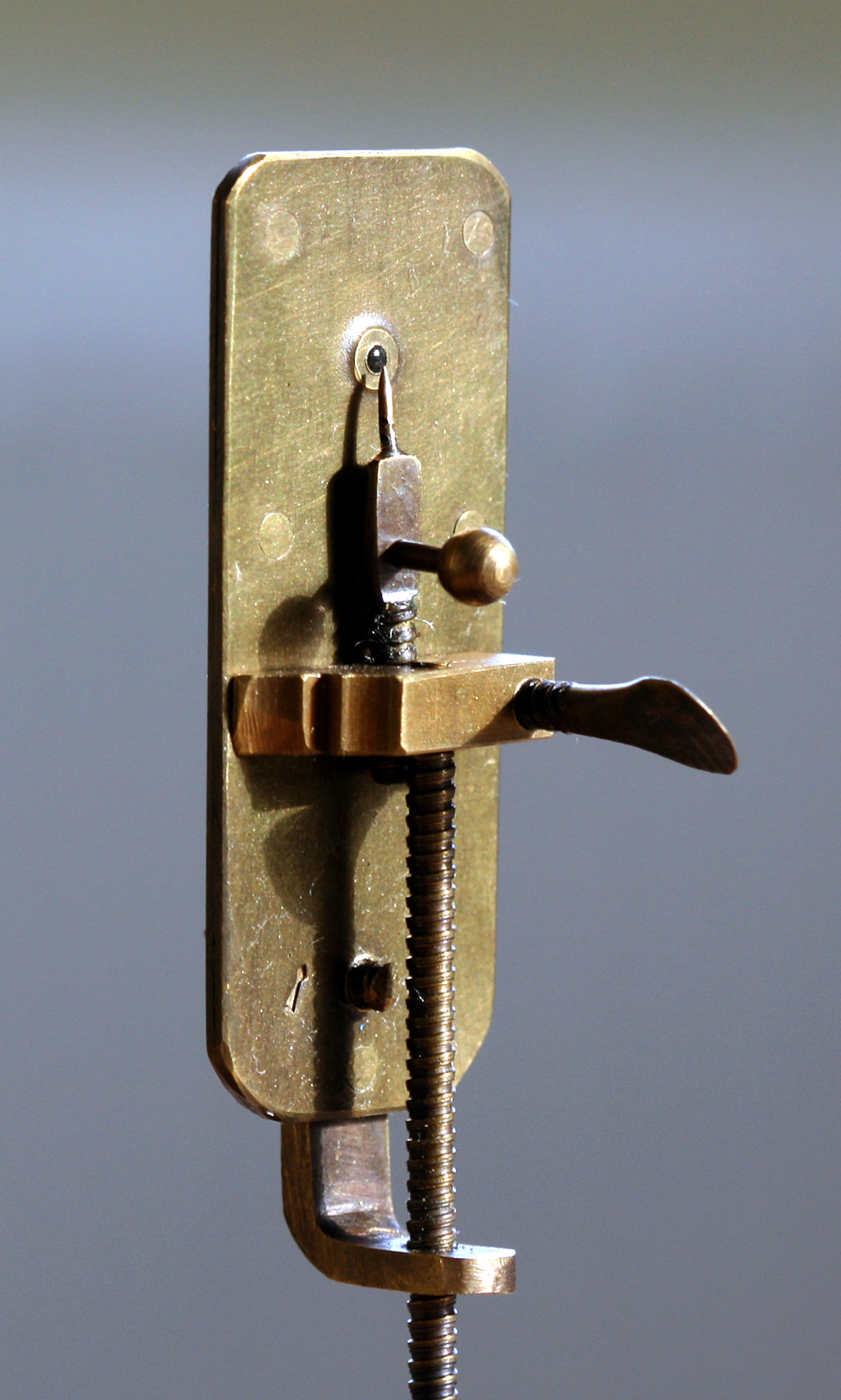 Leeuwenhoek_Microscope_Replica